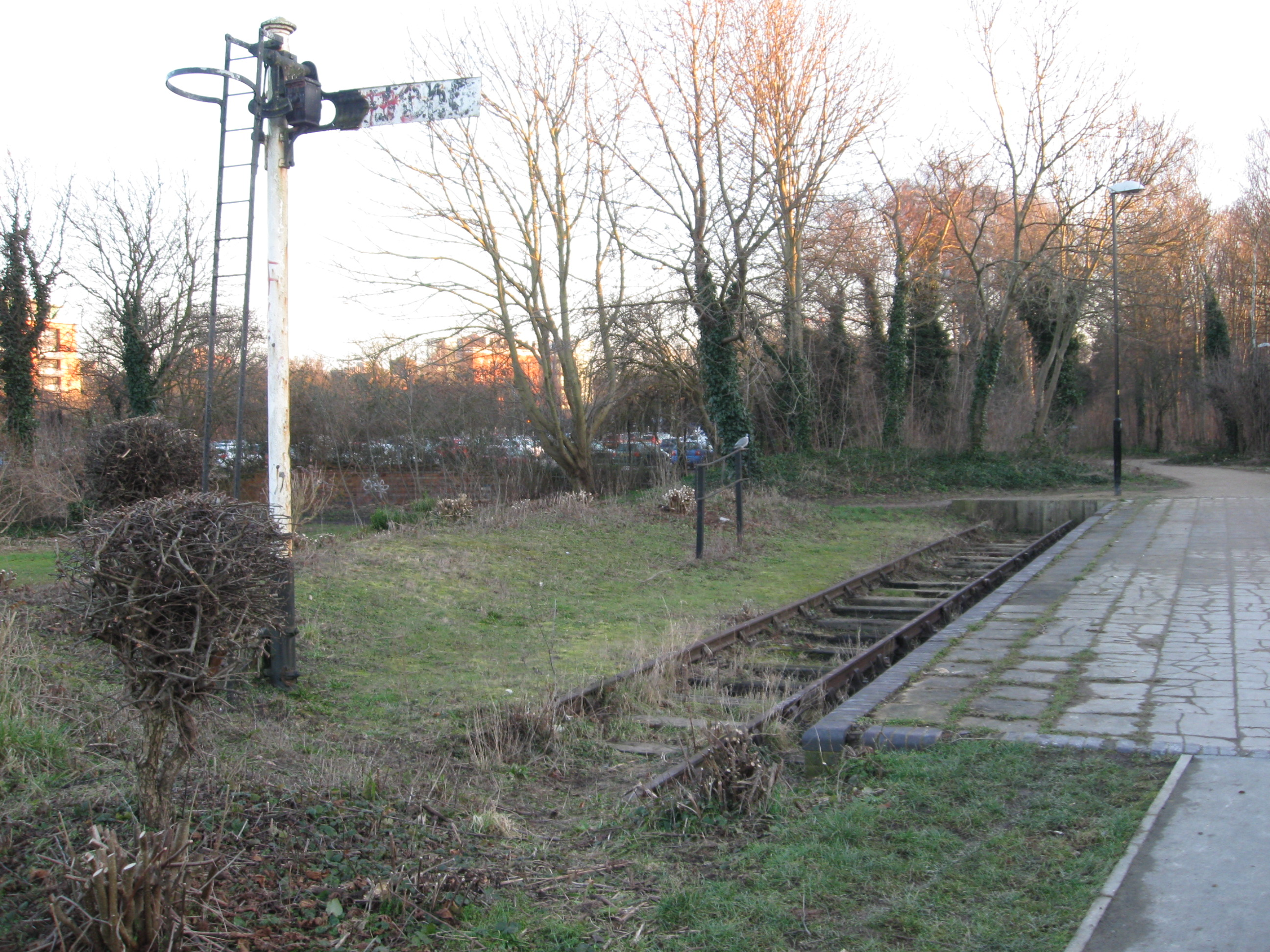 The Rally Park - -rzystanek kolejowy